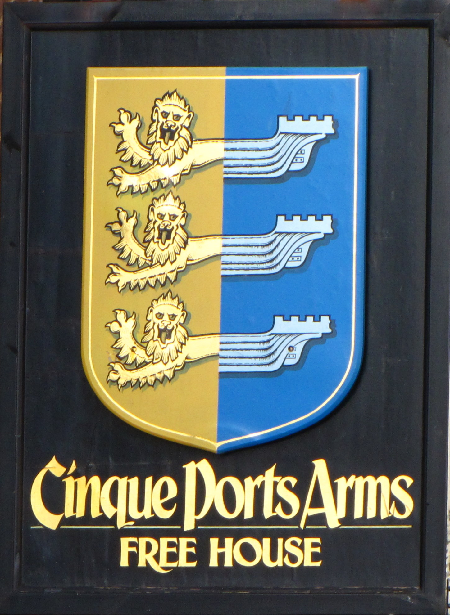 Cinque Ports Arms.